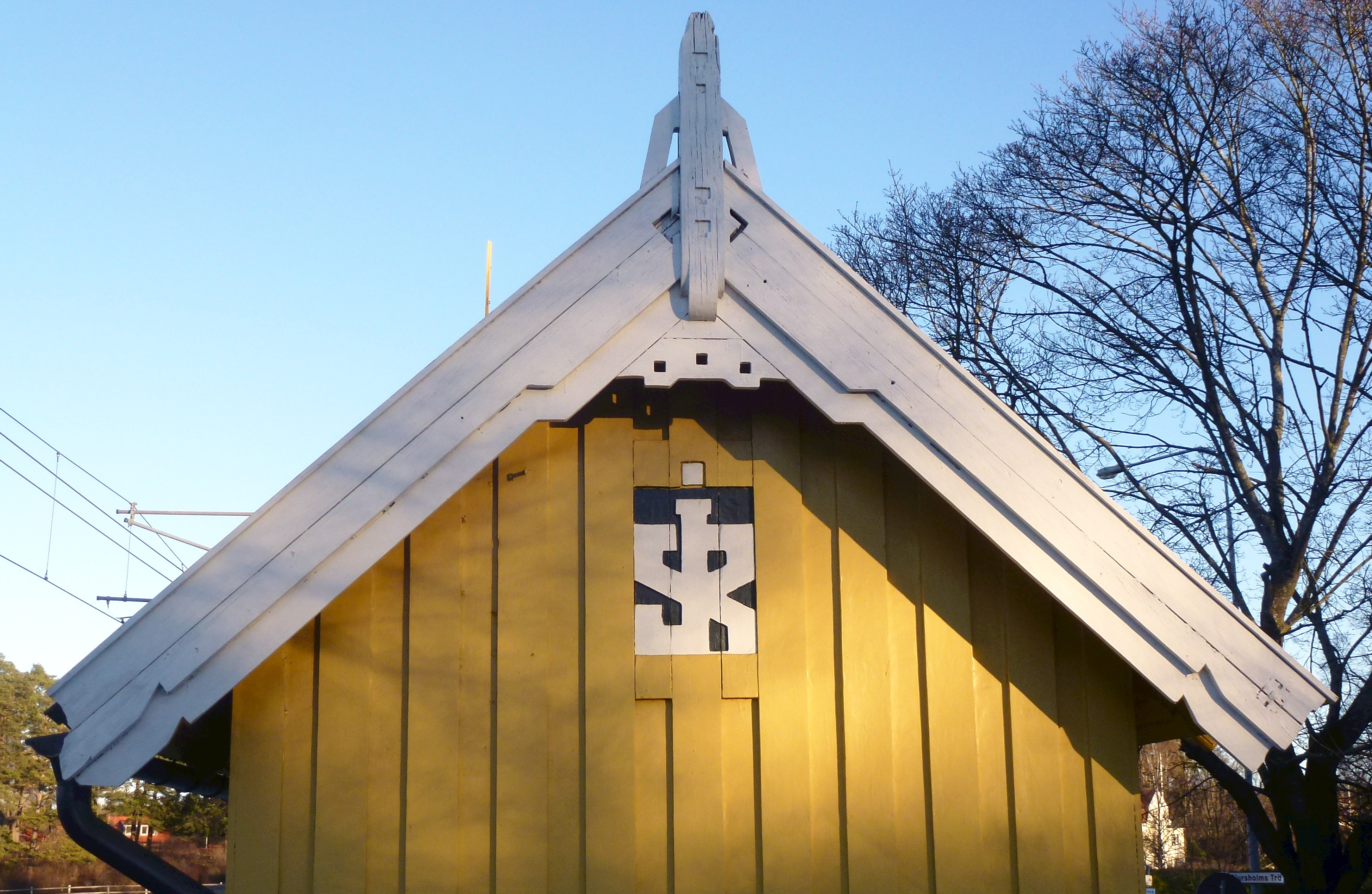 Station Vendevägen